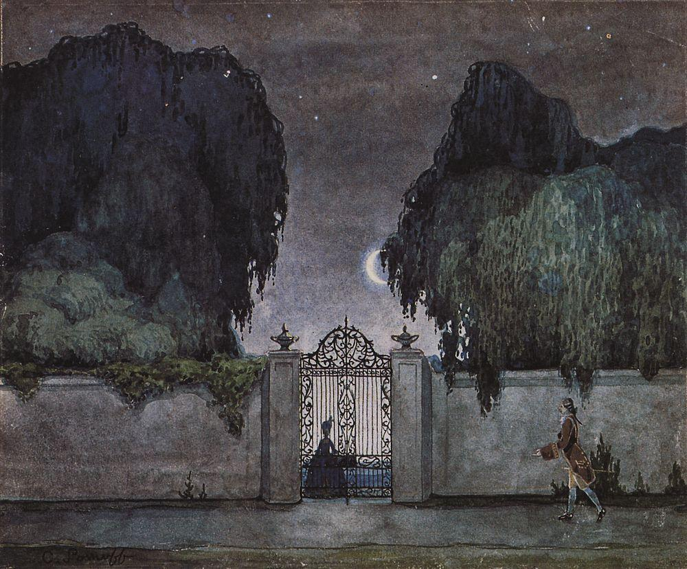 Картина Константина Андреевича Сомова (1869-1939)